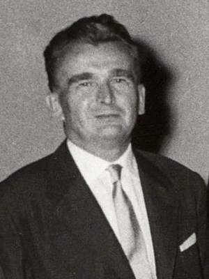 Srpski (latinica): Inventarski broj:1961 180 185